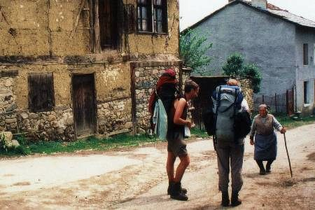 Trektocht door Rila- en Pirin-gebergte in Bulgarije